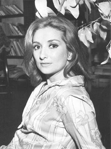 Fotografía blanco y negro sobre papel fotográfico brillante. Norma Aleandro en primer plano, de medio cuerpo, mirando a la cámara. Lleva vestido de cuello de camisa, con botones en el frente, estampado con motivos florales. Detrás se observa una biblioteca.